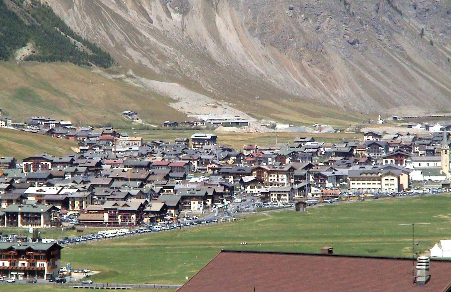 Livigno, panorama